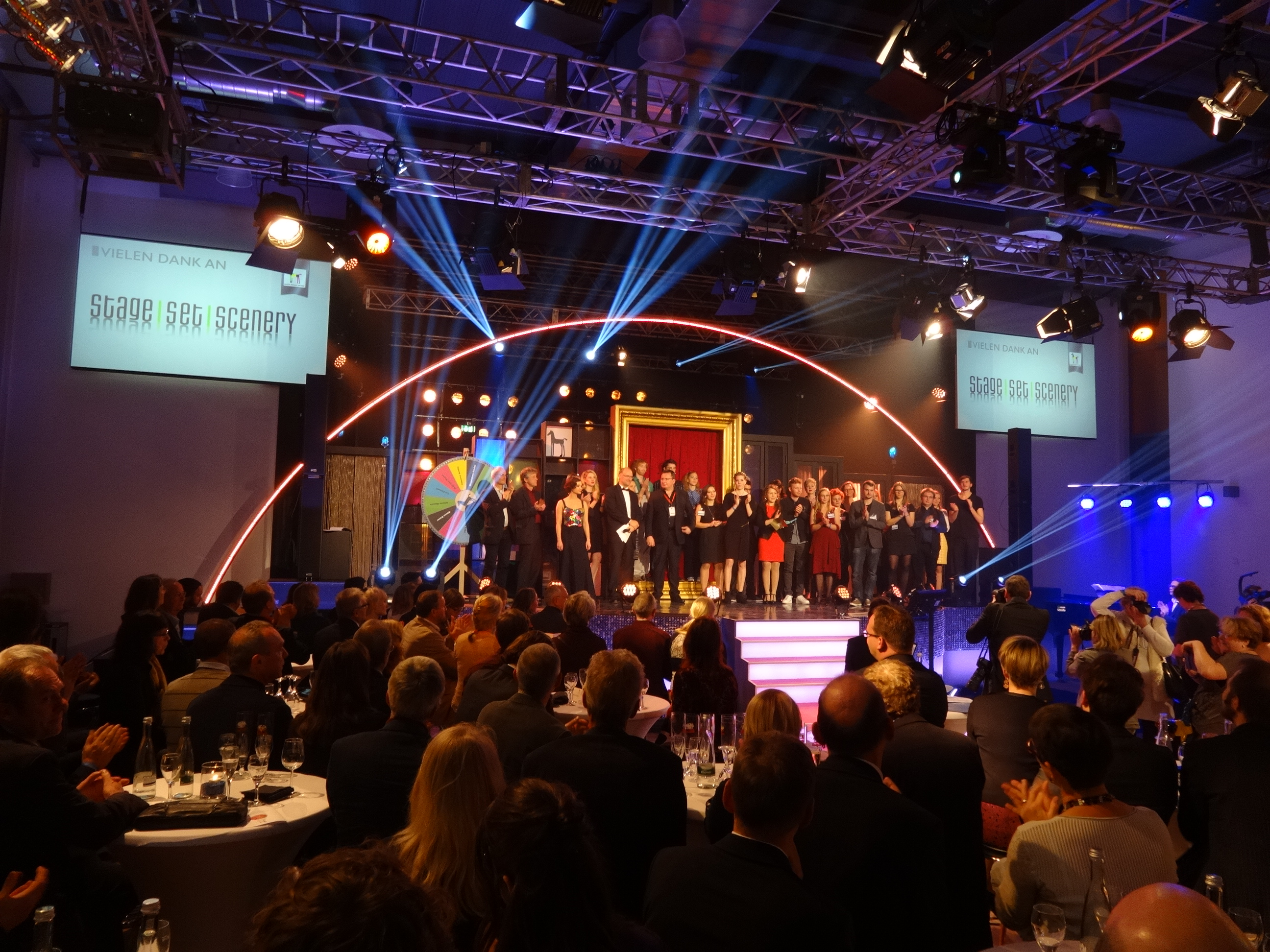 Impression vom Baden-Baden-Award 2014 unter dem Motto „Generalprobe“. Ausgezeichnet wurden 13 Fachkräfte in fünf Ausbildungsberufen. Die Moderation übernahm der SWR3-Comedy-Chef Andreas Müller.